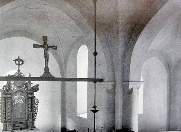 Teilansicht der evangelischen Kirche in Ohle von 1909